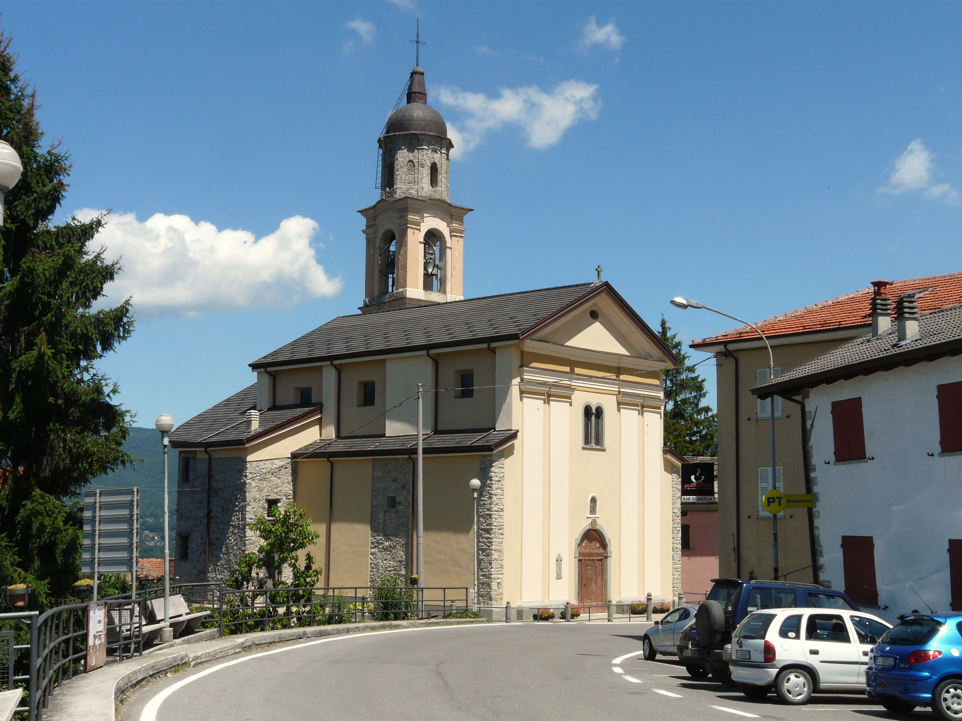 Chiesa di San Bernardino da Siena, Tornolo, Emilia Romagna, Italia